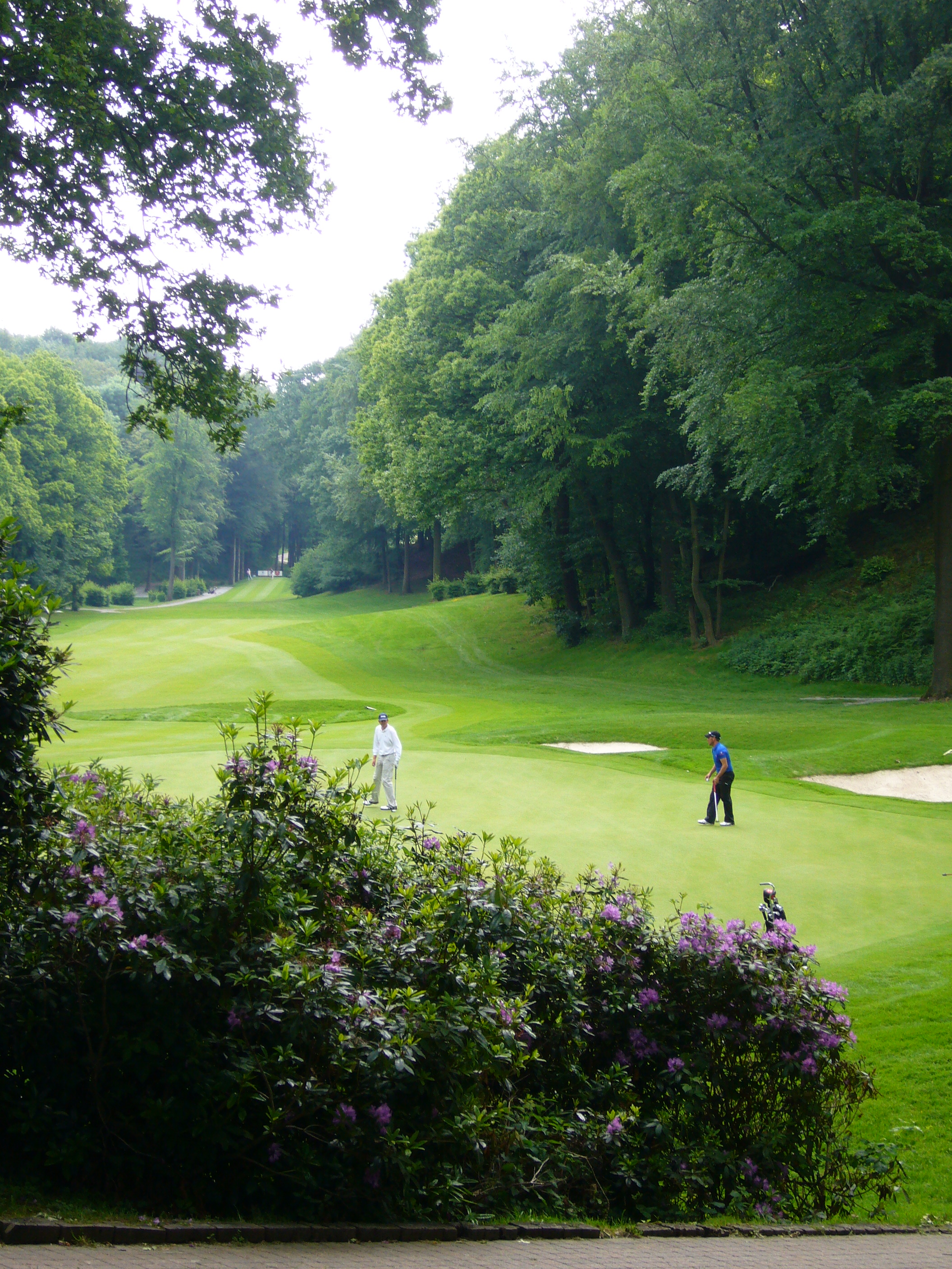 WGolfclub Waterloo, Rolf Muntz en Felipe Lima